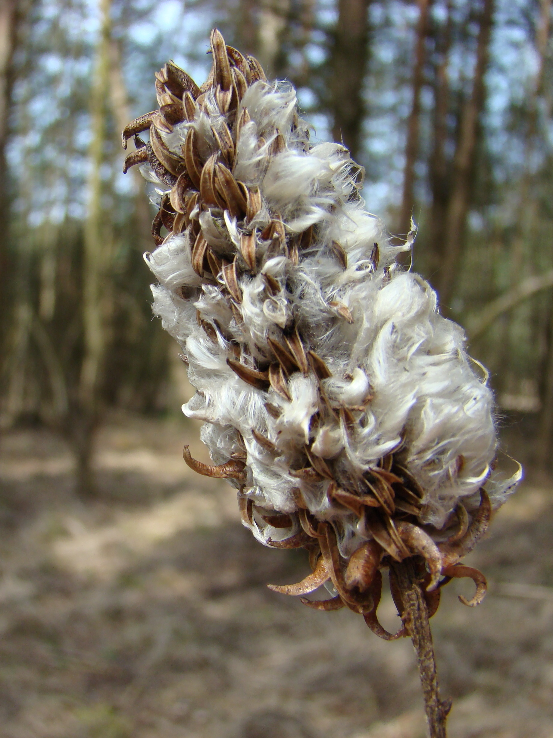 Ausgesamte Fruchtstände der Moorlilie (Narthecium ossifragum), Moor bei Gerdehaus, Südheide, Deutschland